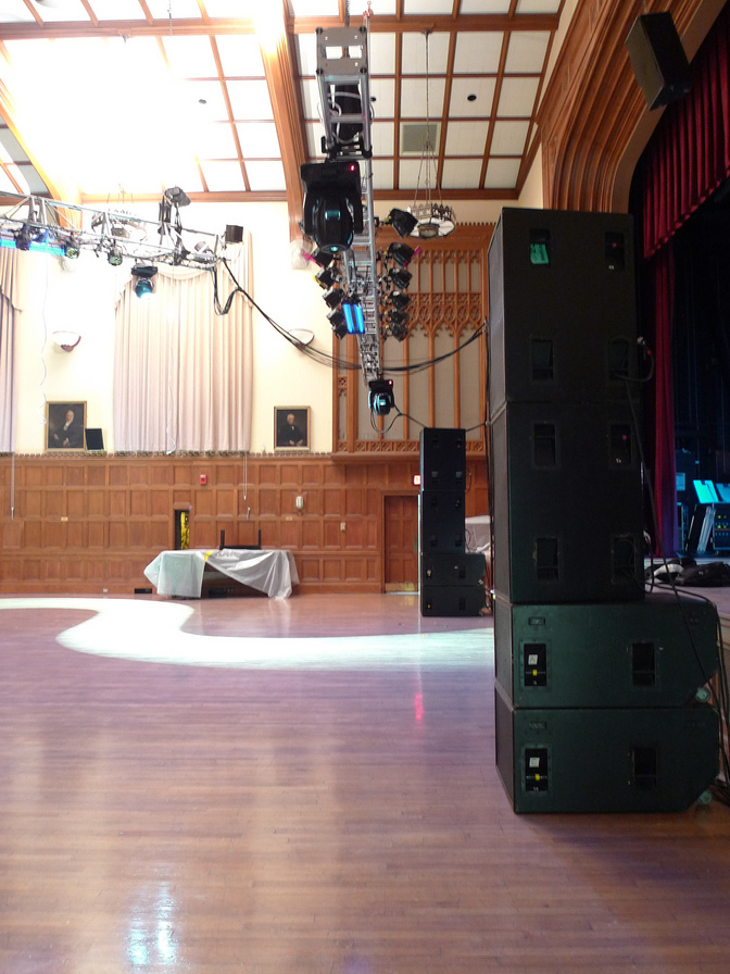 Loudspeakers EAW KF850 (×2/channel) EAW SB1000 (×2/channel)